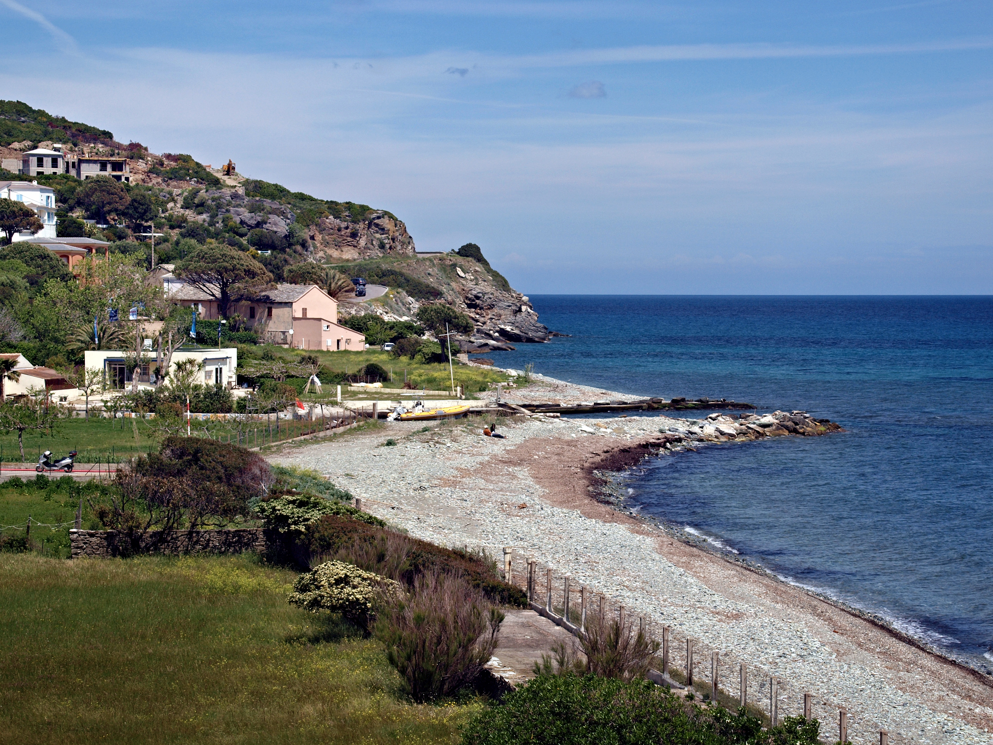 Sisco, Cap Corse (Corse) - Embouchure du ruisseau de Sisco (Fiume di Sisco) à la Marine